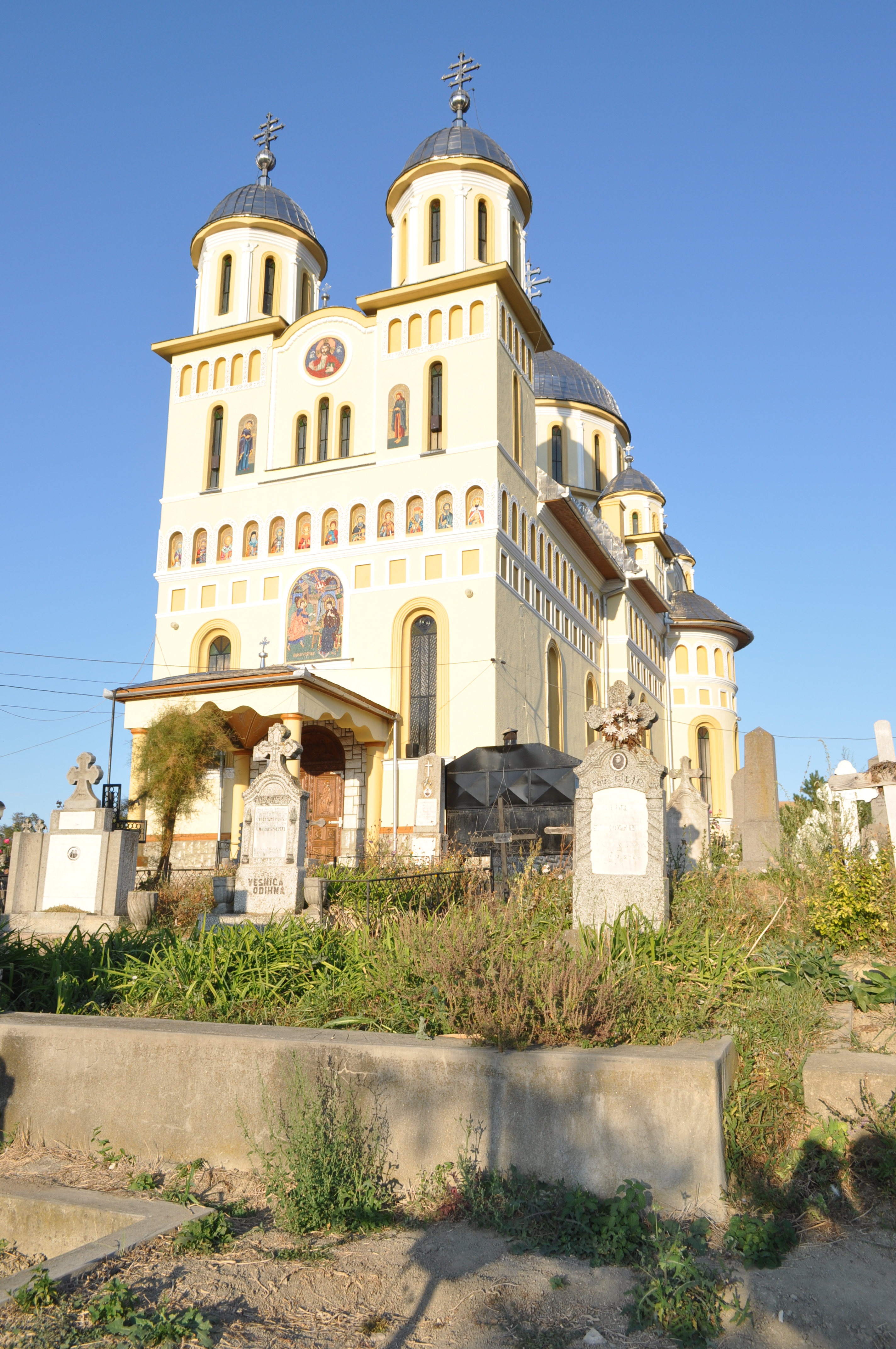 Biserica ortodoxă „Buna Vestire” din satul CUT, comuna CUT, județul ALBA.